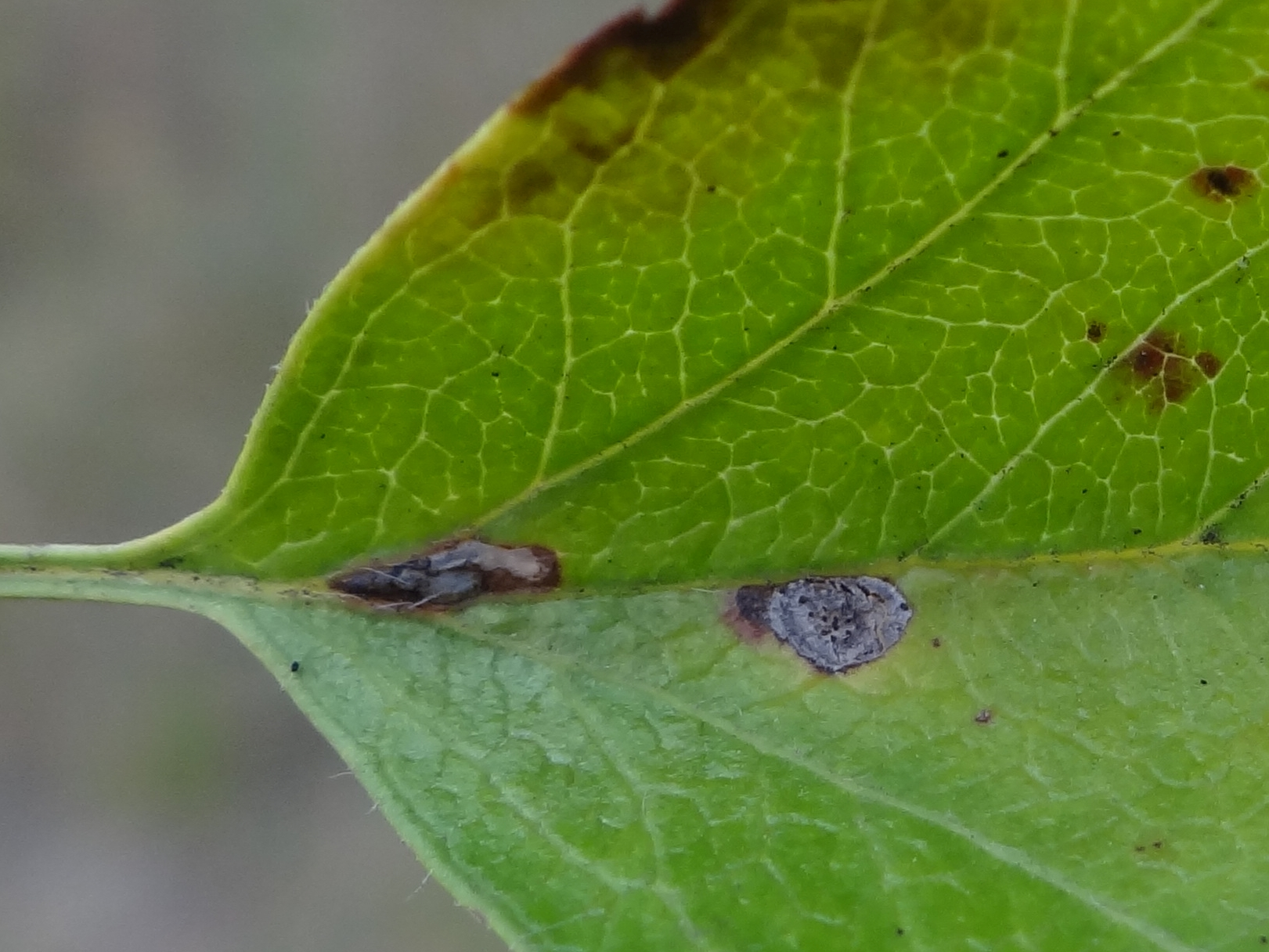 Venturia crataegi on Crataegus sp. Location: Poland, Trzciana, województwo małopolskie